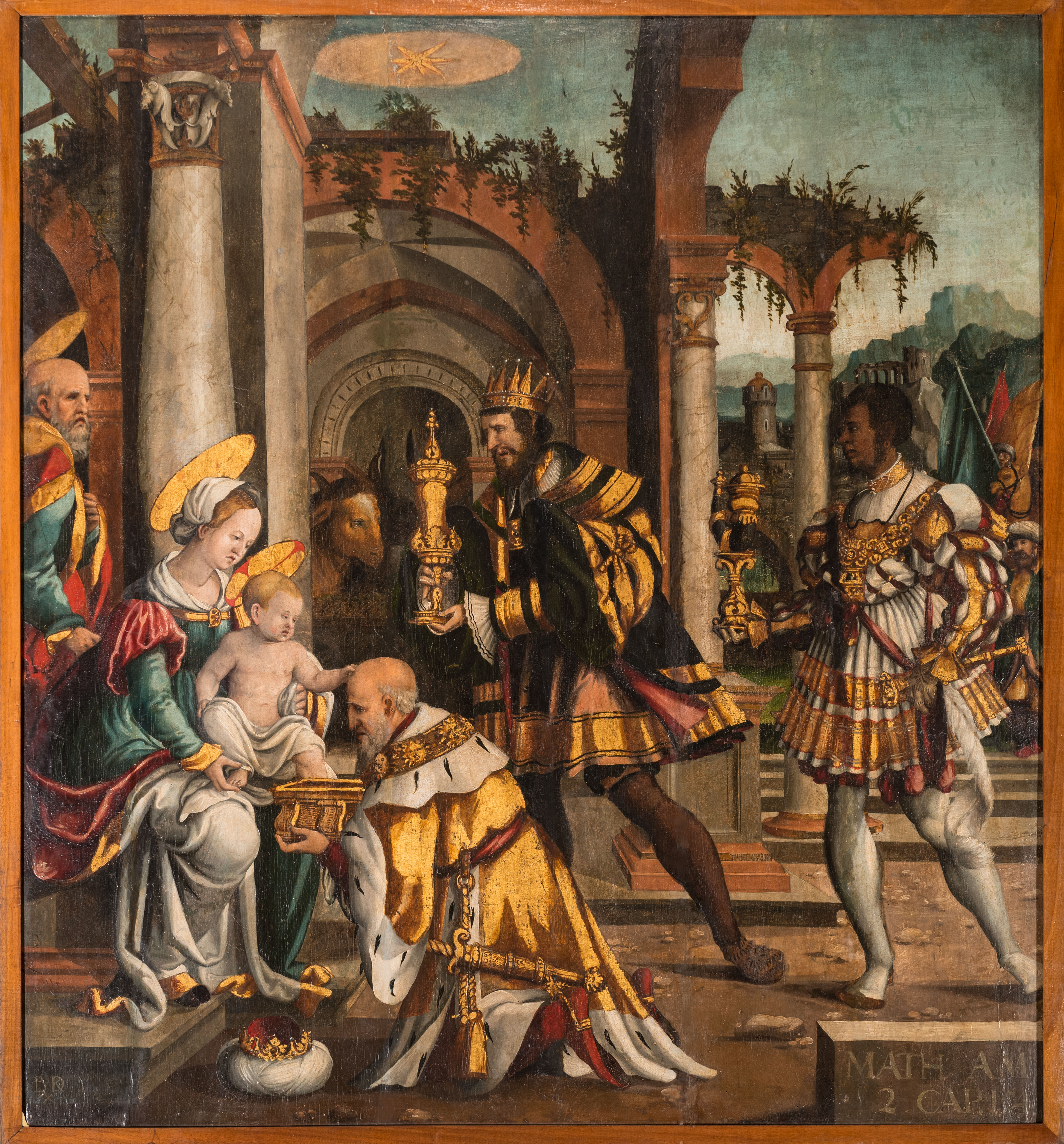 Bartlmä Dill Riemenschneider: Anbetung durch die Hl. Drei Könige; Pfarrkirche Heiligkreuz in Burgstall (Italien)